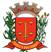 Brasão de Armas do município paulista de General Salgado, Brasil.